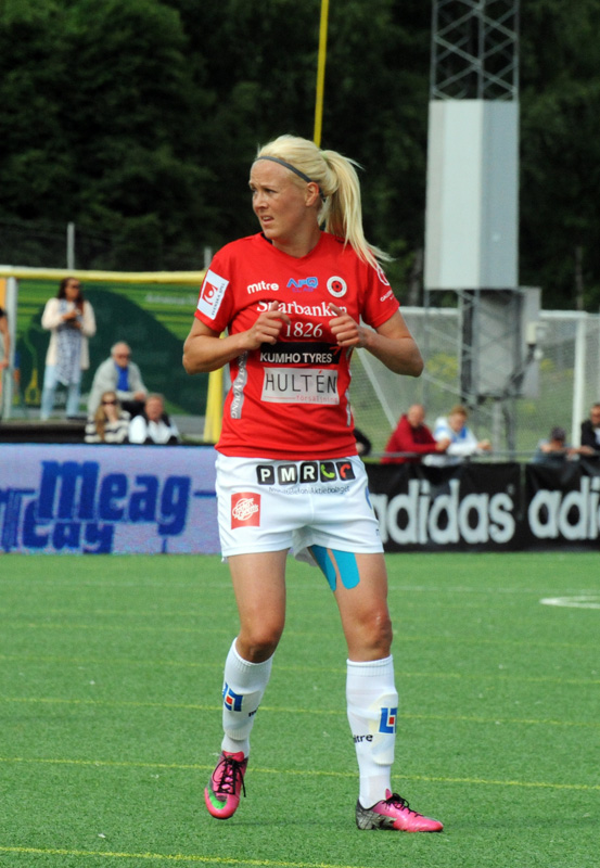 a_19_8212